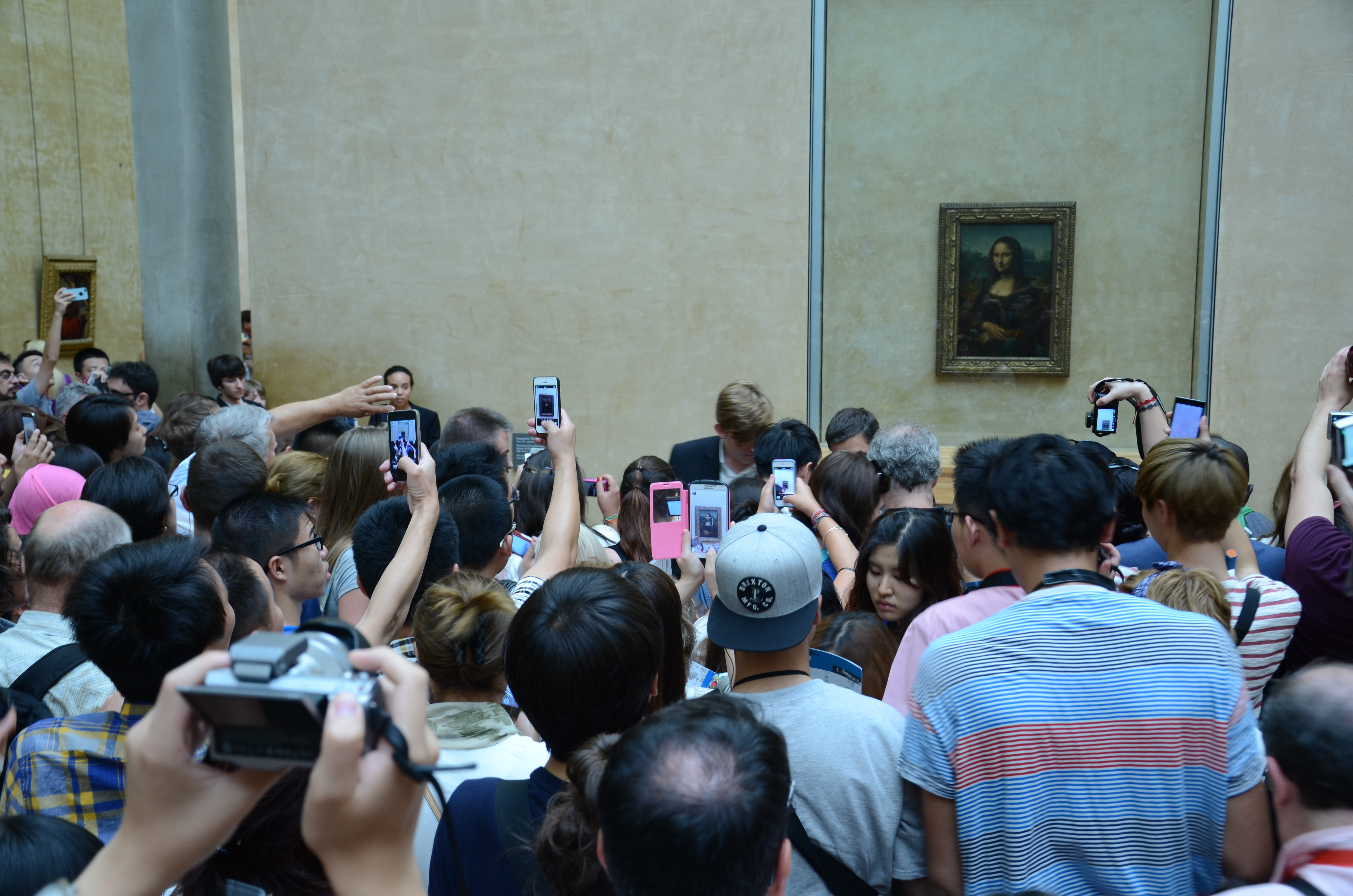 Touristen fotograferen de Mona Lisa in het Louvre.